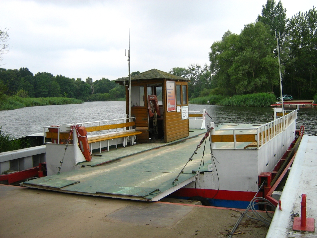 Seilfähre vom Festland zur Burgwallinsel im Teterower See (Landkreis Rostock, Mecklenburg-Vorpommern).